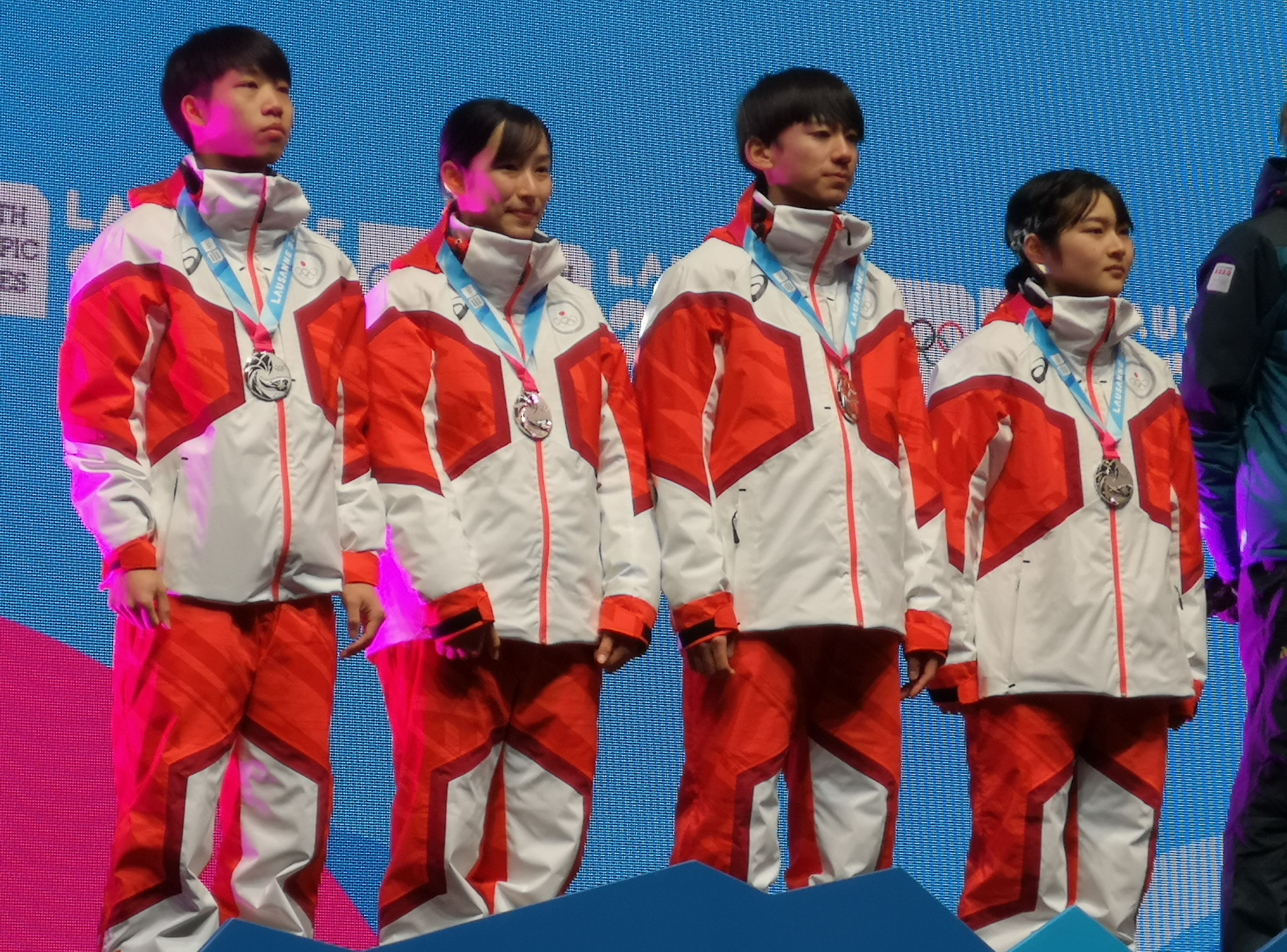 L'équipe japonaise pendant la remise des médailles du saut à ski par équipes aux JOJ de Lausanne 2020.